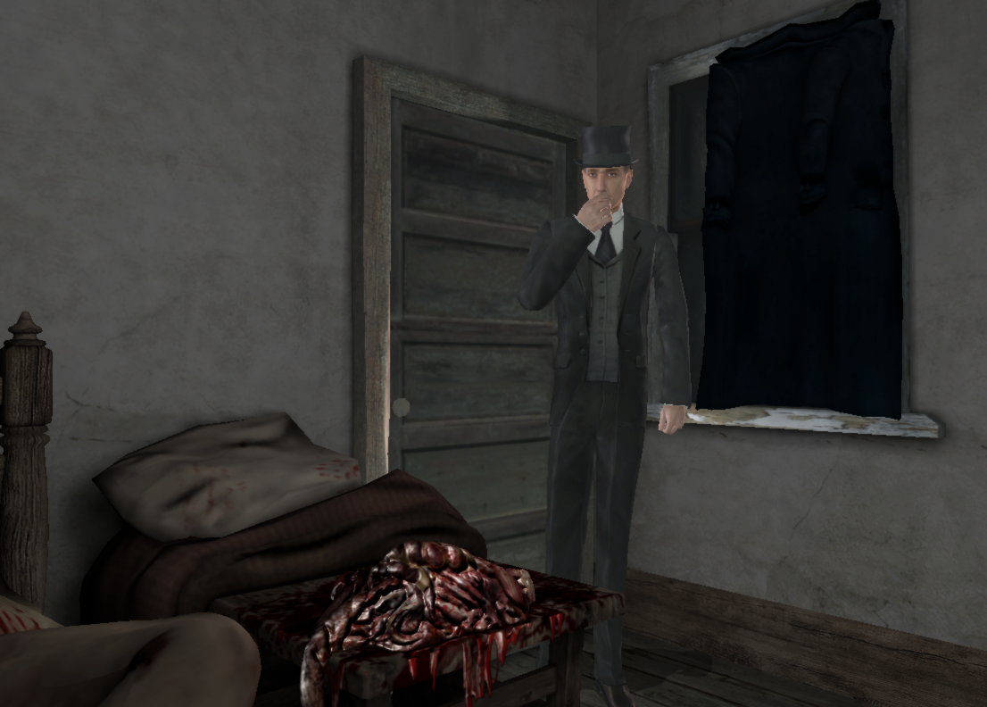 Capture d'écran du jeu Sherlock Holmes contre Jack l'Éventreur. Holmes est ici dans la chambre de Mary Jane Kelly, la dernière victime attribuée à Jack l'Éventreur.